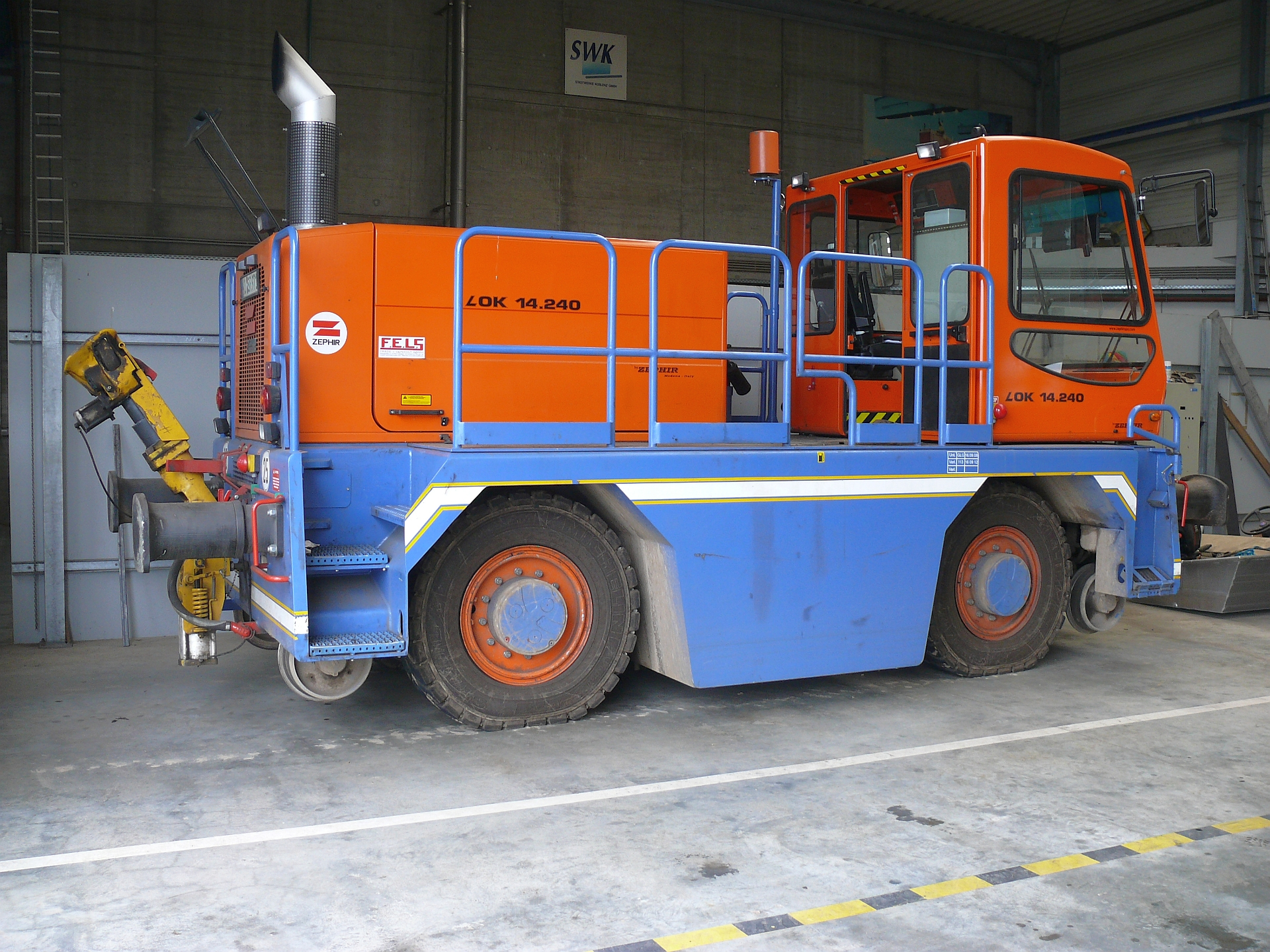 Zephir 14.240, Koblenz, 06.06.2012